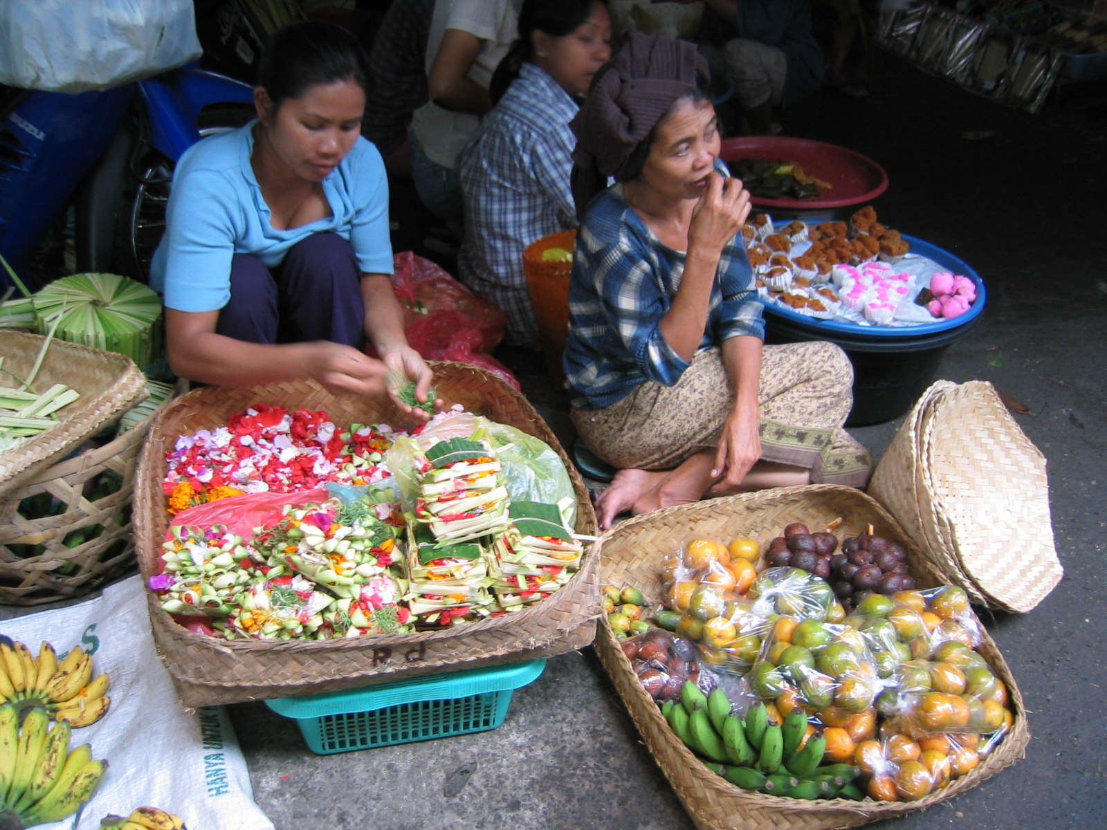 Ubud, Bali, Indonesia, The Market